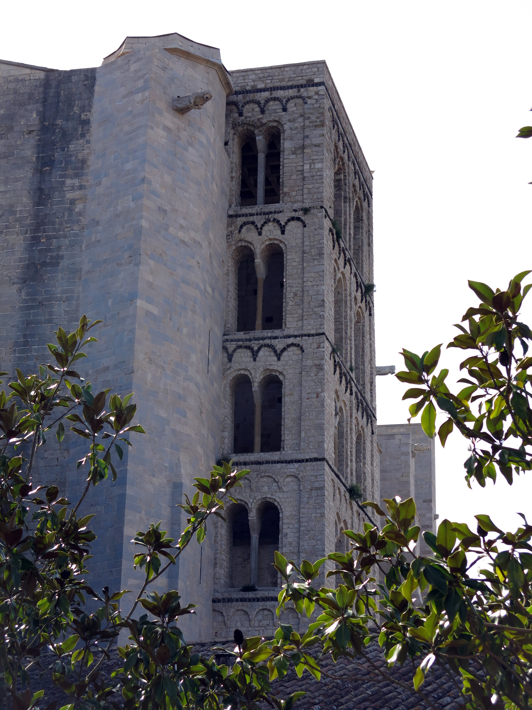 Catedral de Santa Maria (Girona)